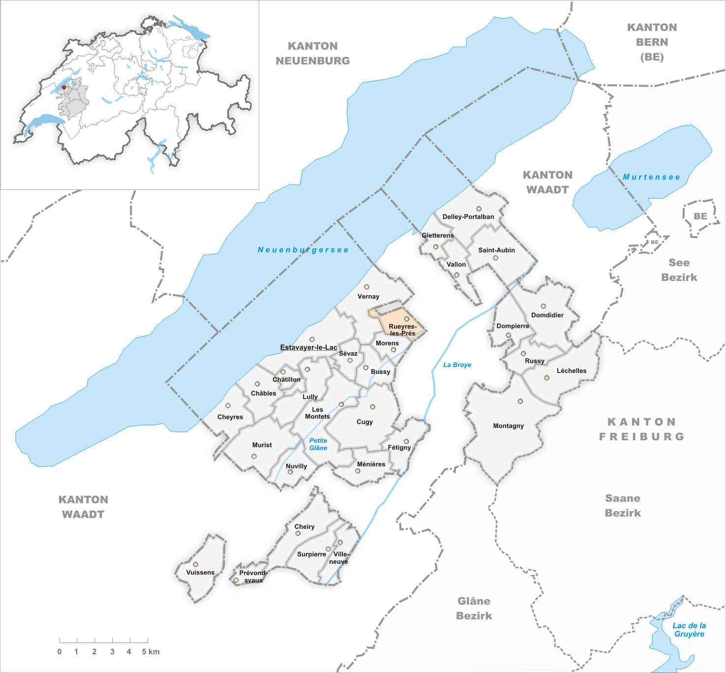 Municipality Rueyres-les-Prés